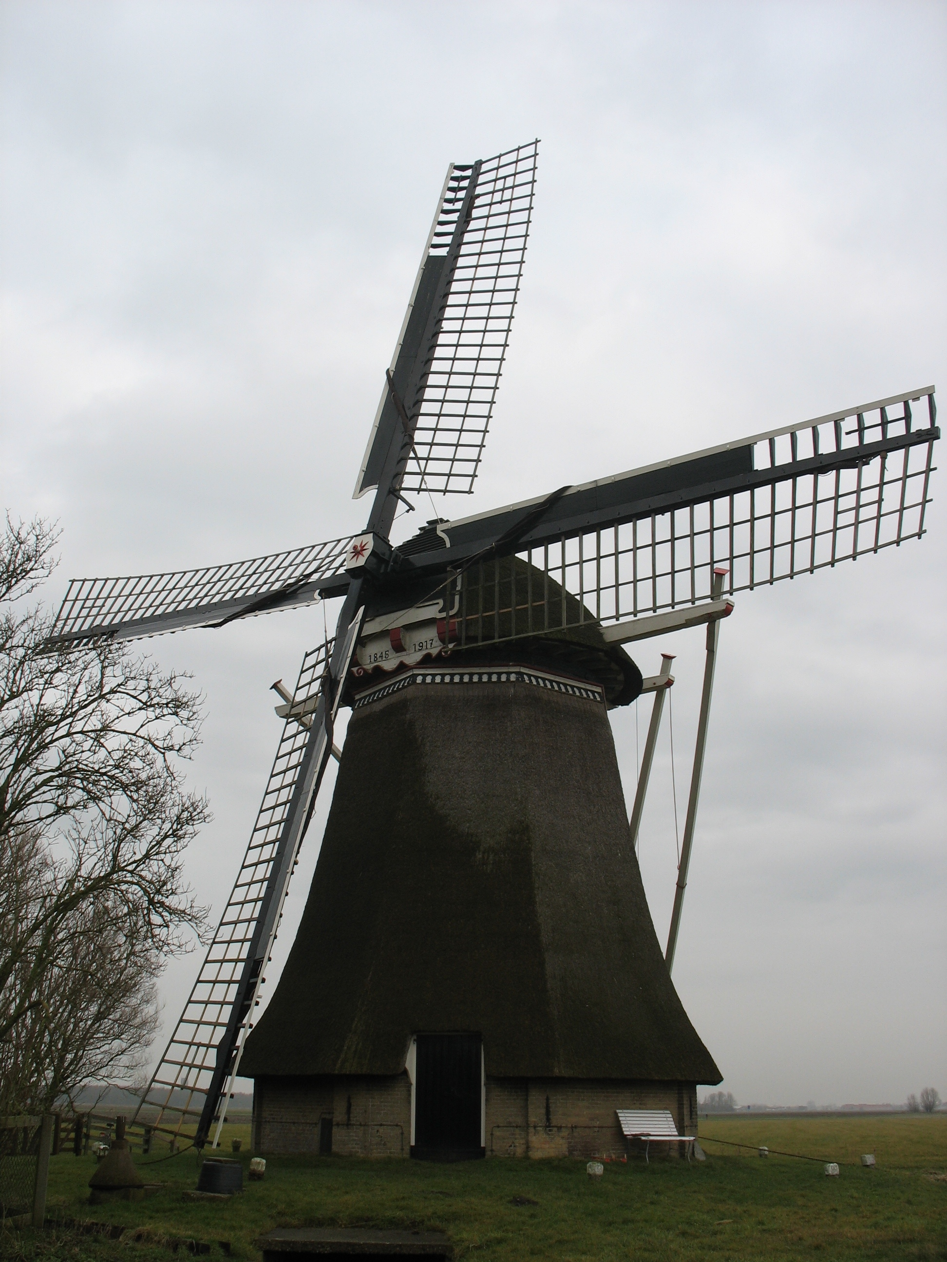 Dit is een foto van poldermolen de Phenix bij Marrum. De Phenix werd in 1845, als houtzaagmolen in Leeuwarden gebouwd. In 1917 brandde de voorganger van de huidige molen, voor de herbouw werd de Leeuwarder zaagmolen gebruikt. In 1976 werd de molen eigendom van stichting de Fryske Mole. De laatste restauratie vond plaats in 1997